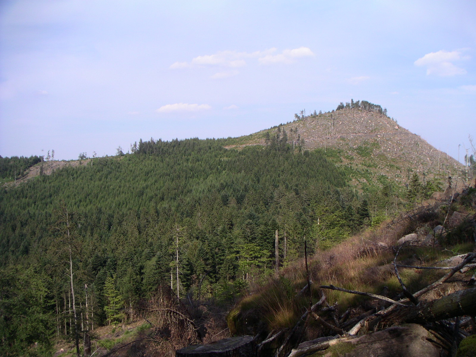 versant ouest du Petit Donon (67)